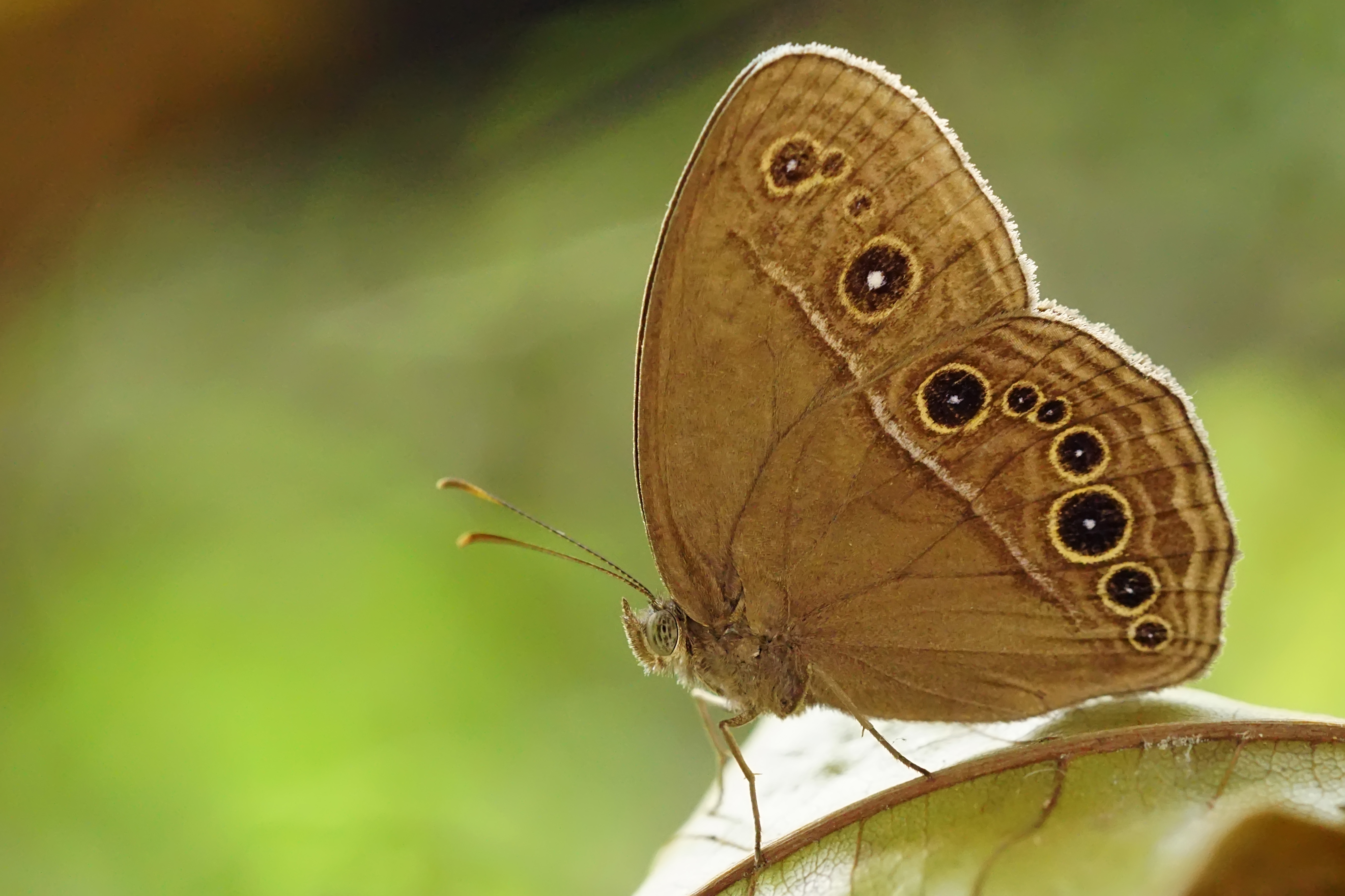 中文（台灣）: 曲斑眉眼蝶 Mycalesis perseus blasius